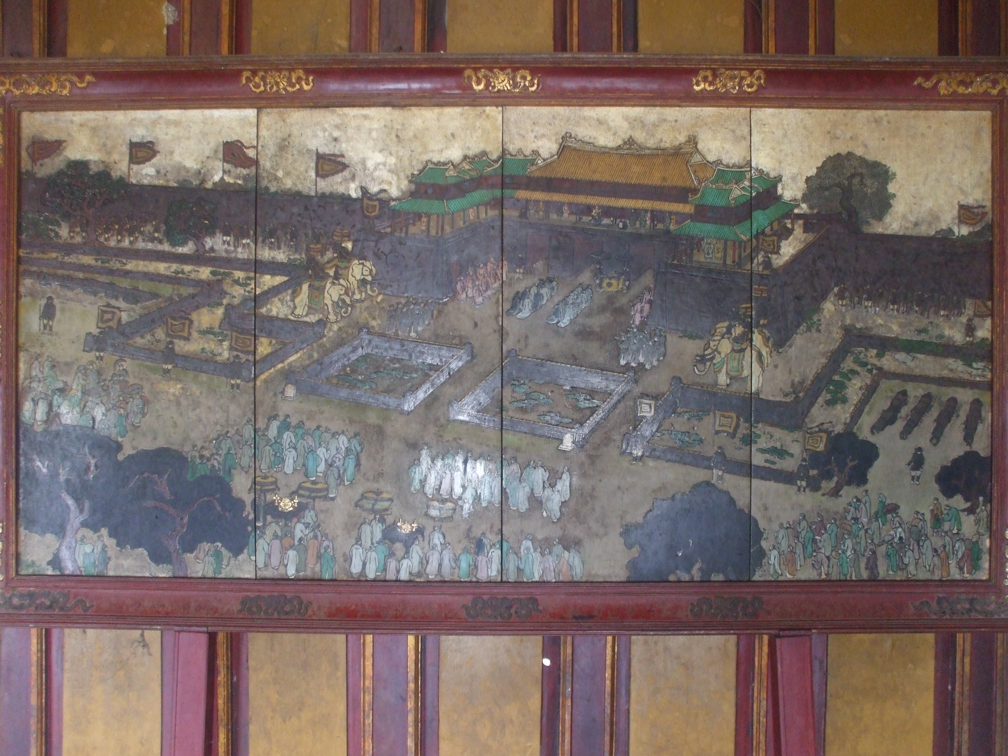 Tranh kính (kiếng) trong cung đình nhà Nguyễn (Huế, Việt Nam).